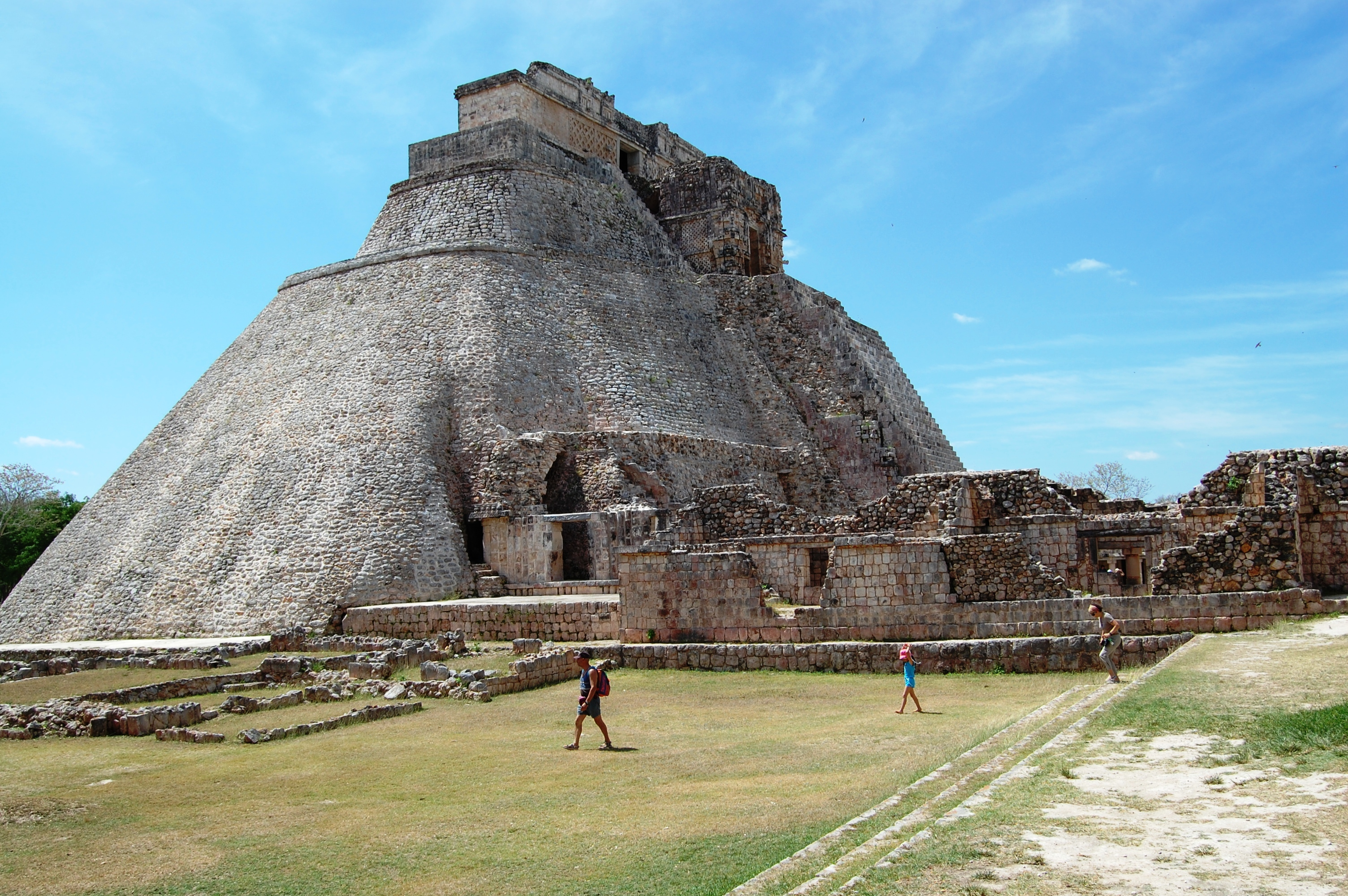 Uxmal, Mexico Piramide del Adivino (front)